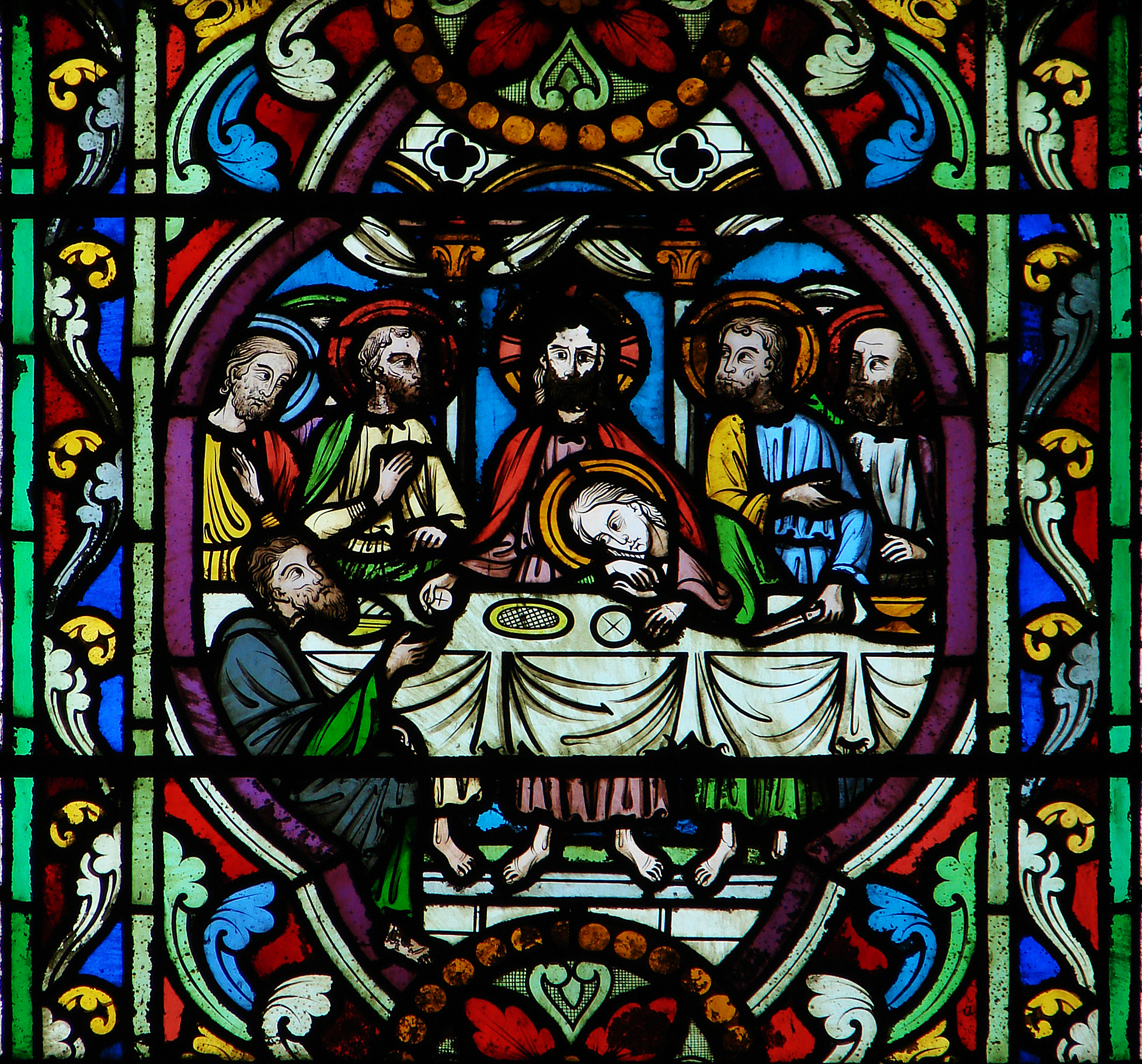 Détail d'un vitrail néogothique de la cathédrale de Meaux: la Cène.